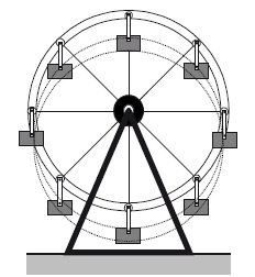 Cinemática del Sólido Rígido. Movimiento de traslación.